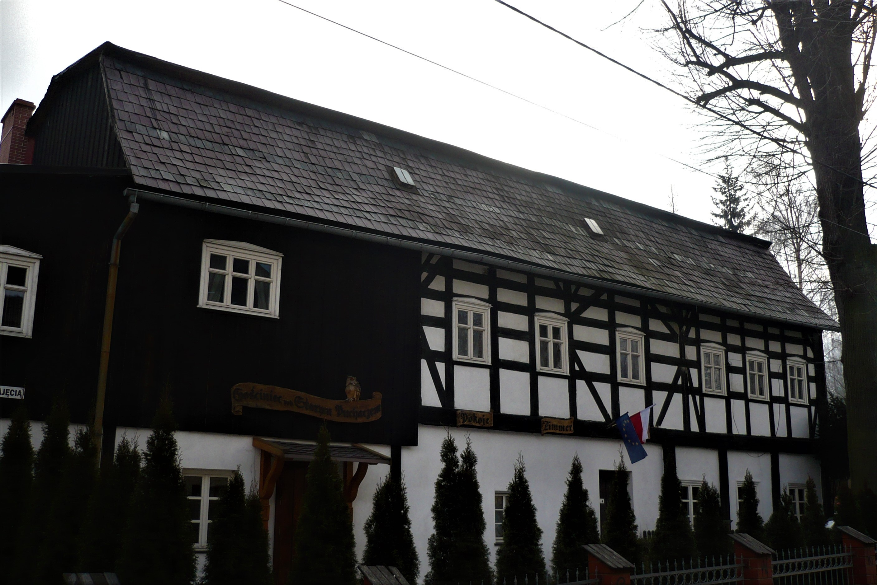 Walim, dom